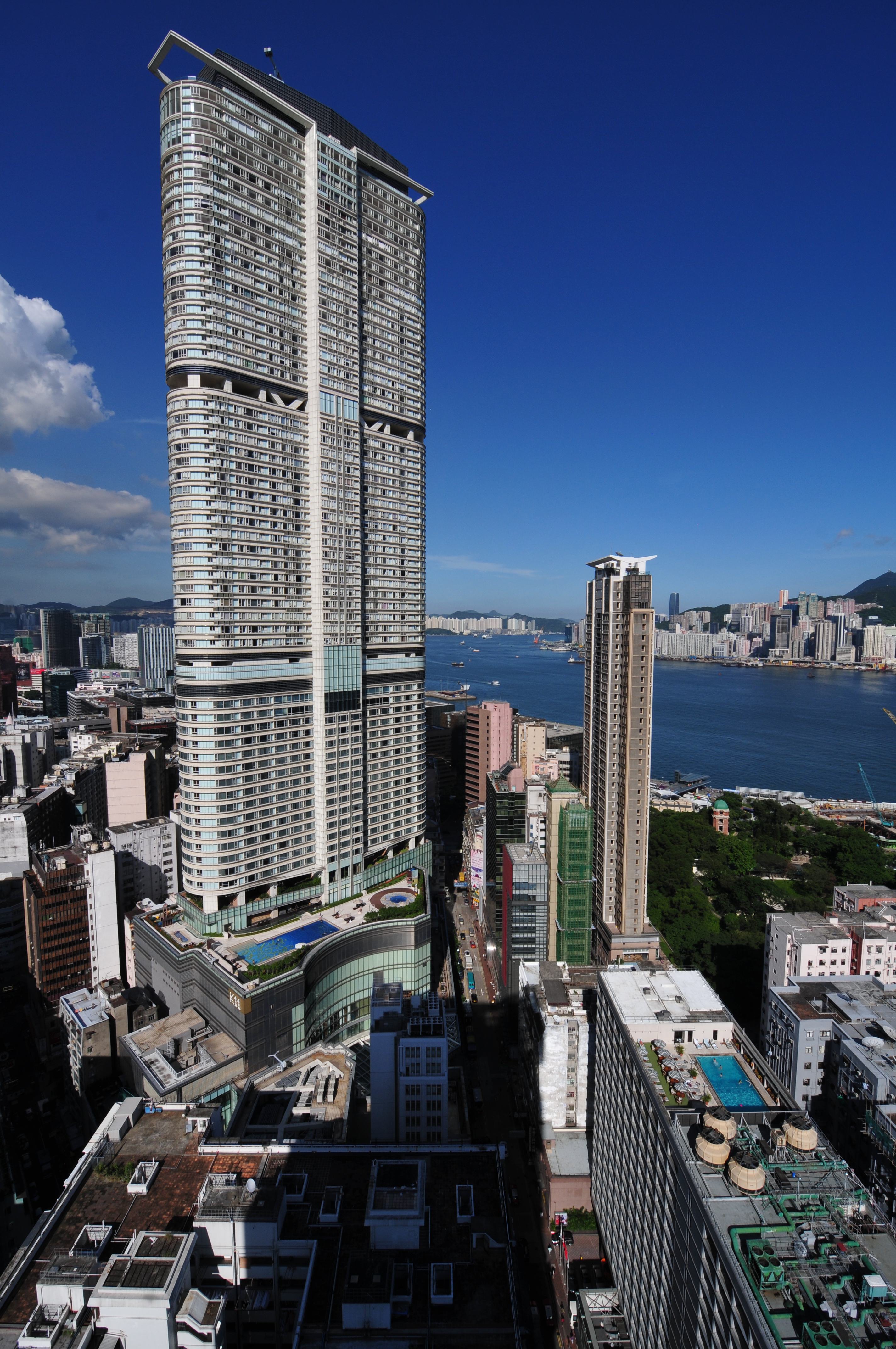 Wikimania 2013 Hongkong